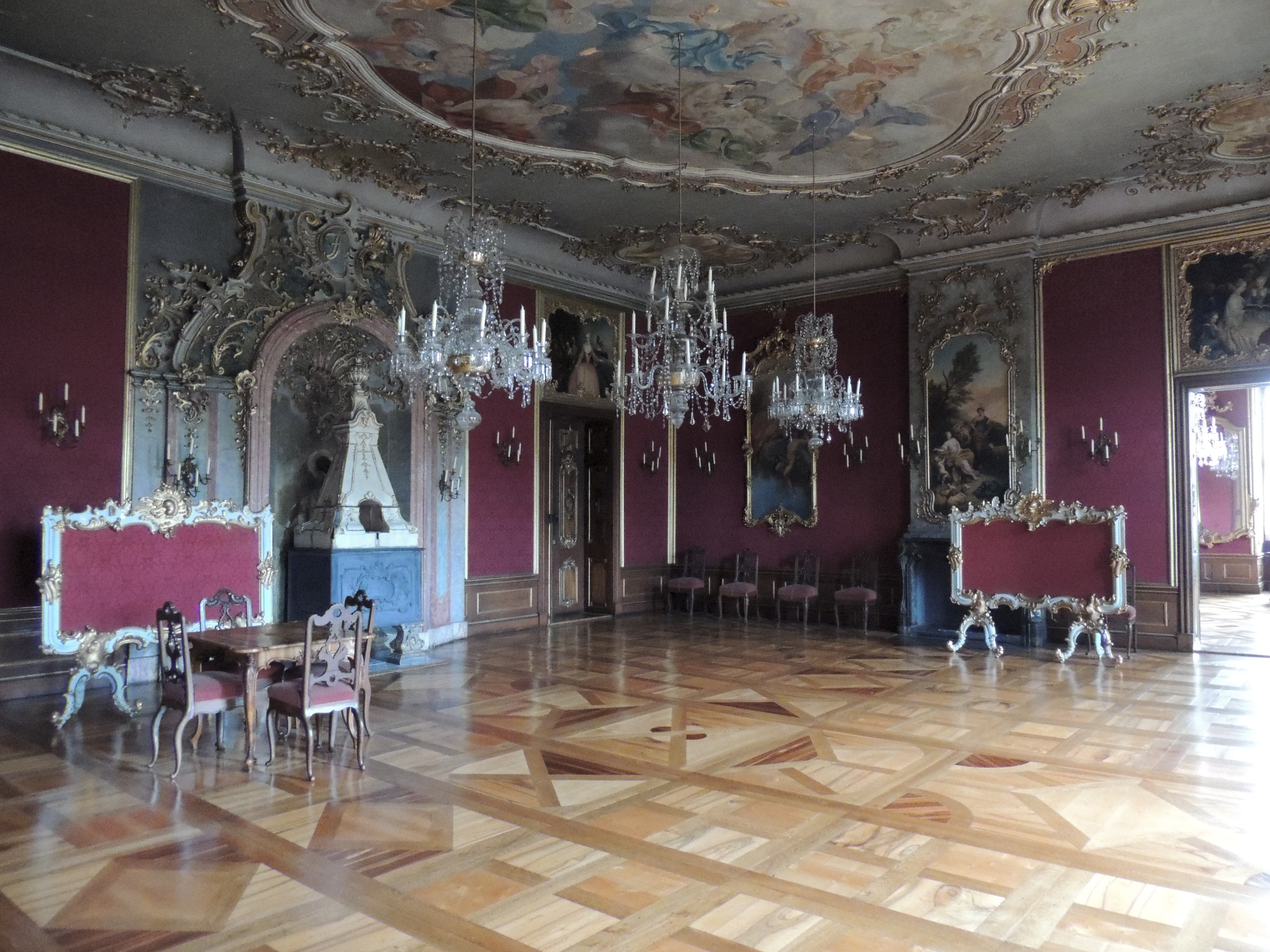 Wohn- und Prunkräume von Schloss Heidecksburg